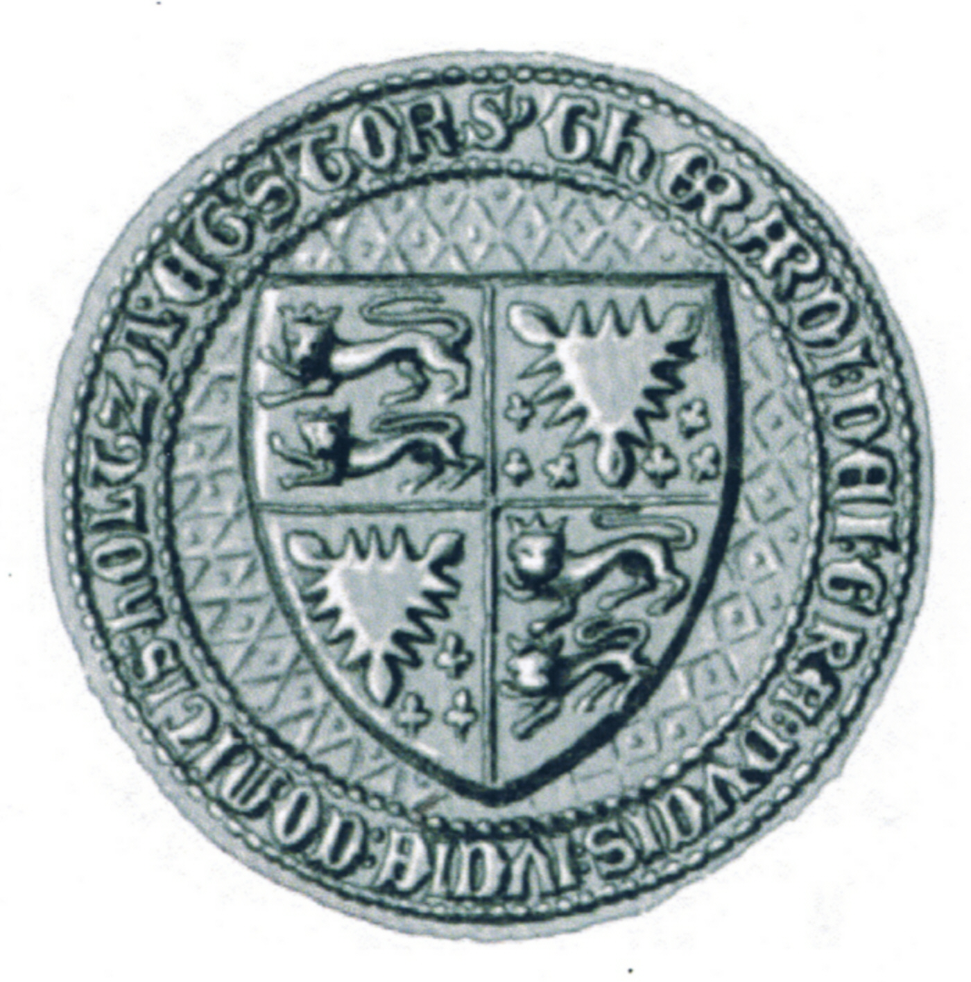 Siegel des Gerhard VI. (* um 1367; † 4. August 1404), Sohn von Graf Heinrich II. aus der Rendsburger Linie des Hauses Schauenburg und Ingeburg von Mecklenburg. 1382 wurde er Graf von Holstein-Rendsburg. Das Siegel stammt aus der Zeit um 1392.